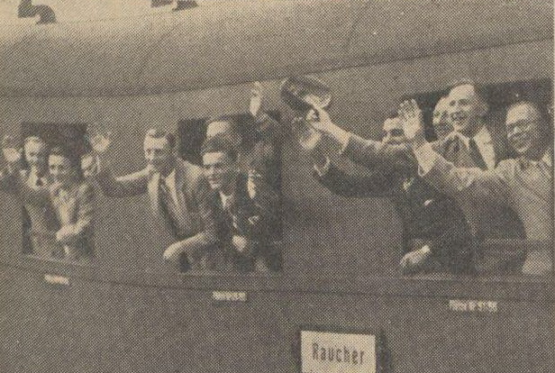 10 juli 1933 (De spelers van de Amsterdamsche voetbalvereen. Ajax vertrokken gisteren uit de hoofdstad voor een tournee naar den Balkan.)